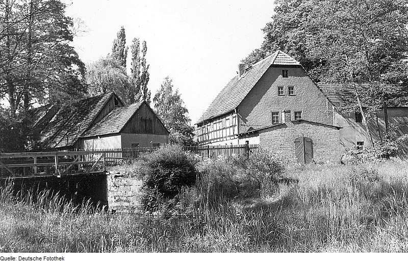 Original image description from the Deutsche Fotothek Schwepnitz-Cosel. Bollbuck Mühle, Ansicht über den Saleskbach